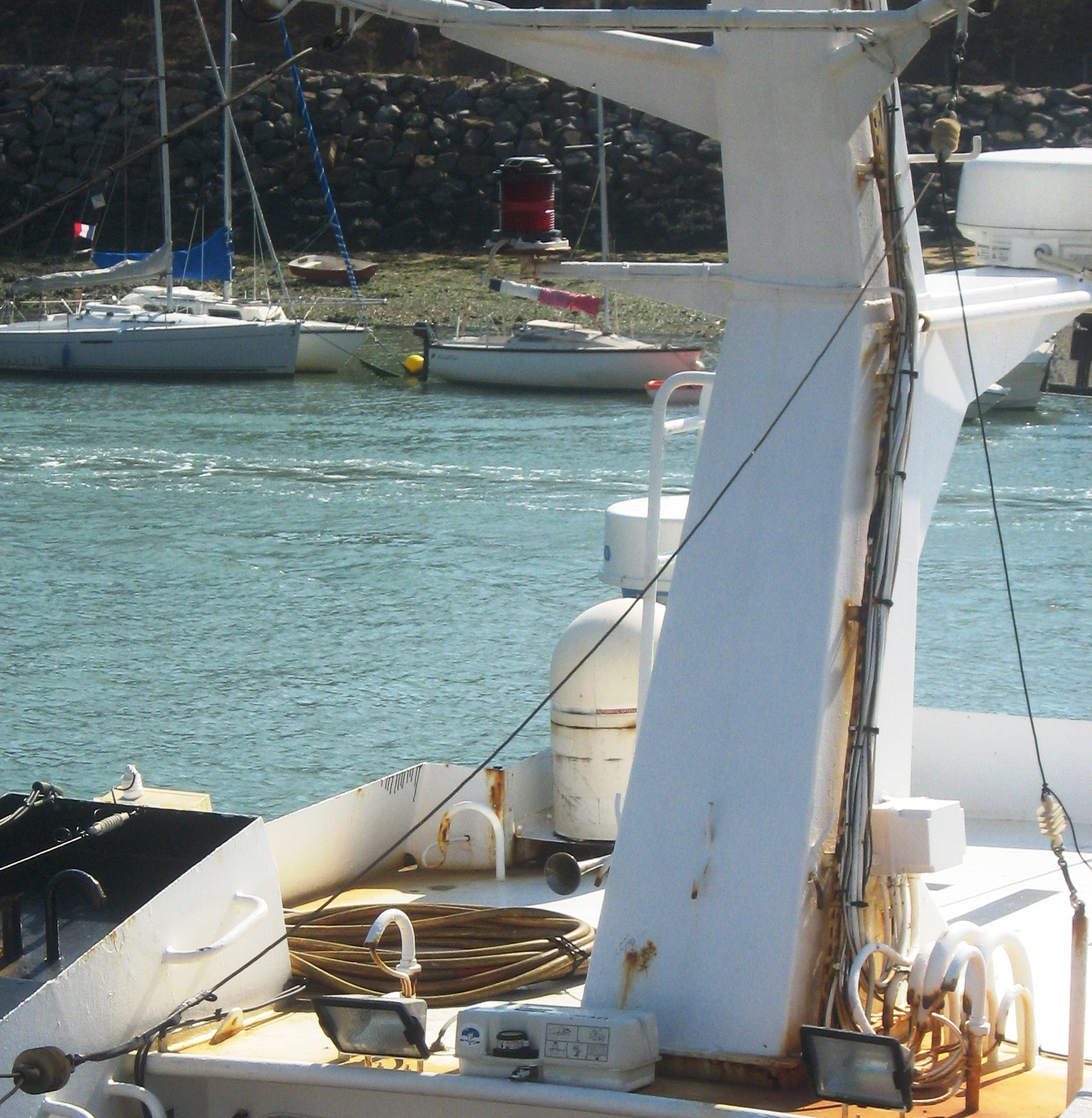 antenne monopole, antenne long fils.